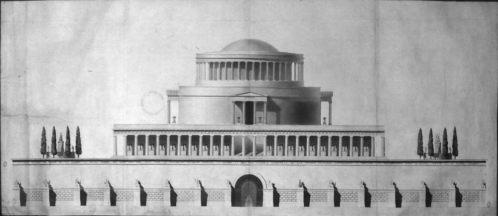 Entwurf von Auguste Henri Victor Grandjean de Montigny